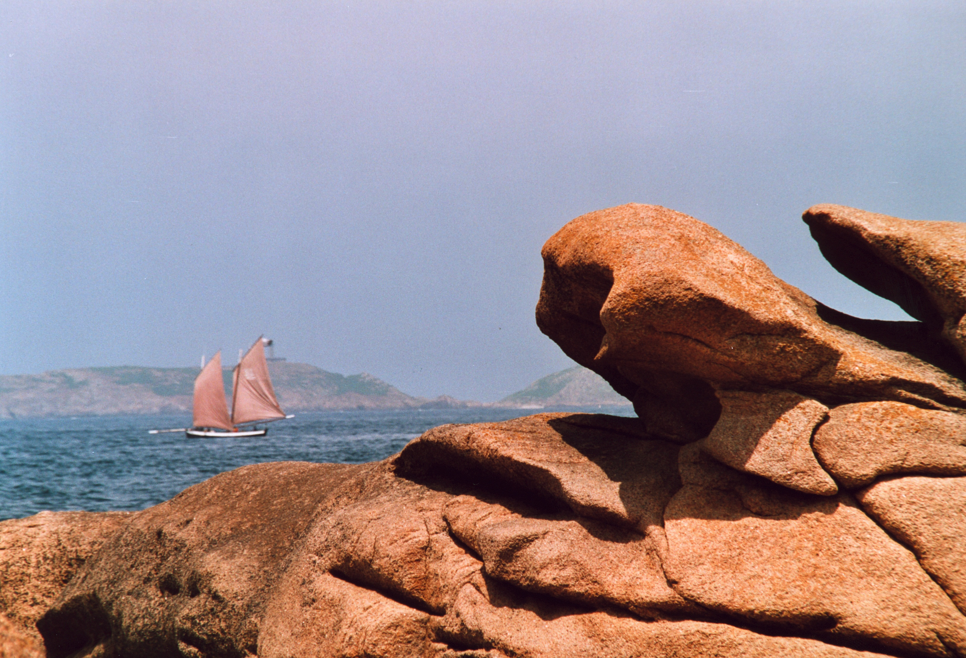 France Bretagne Côtes d'Armor Côte de granit rose